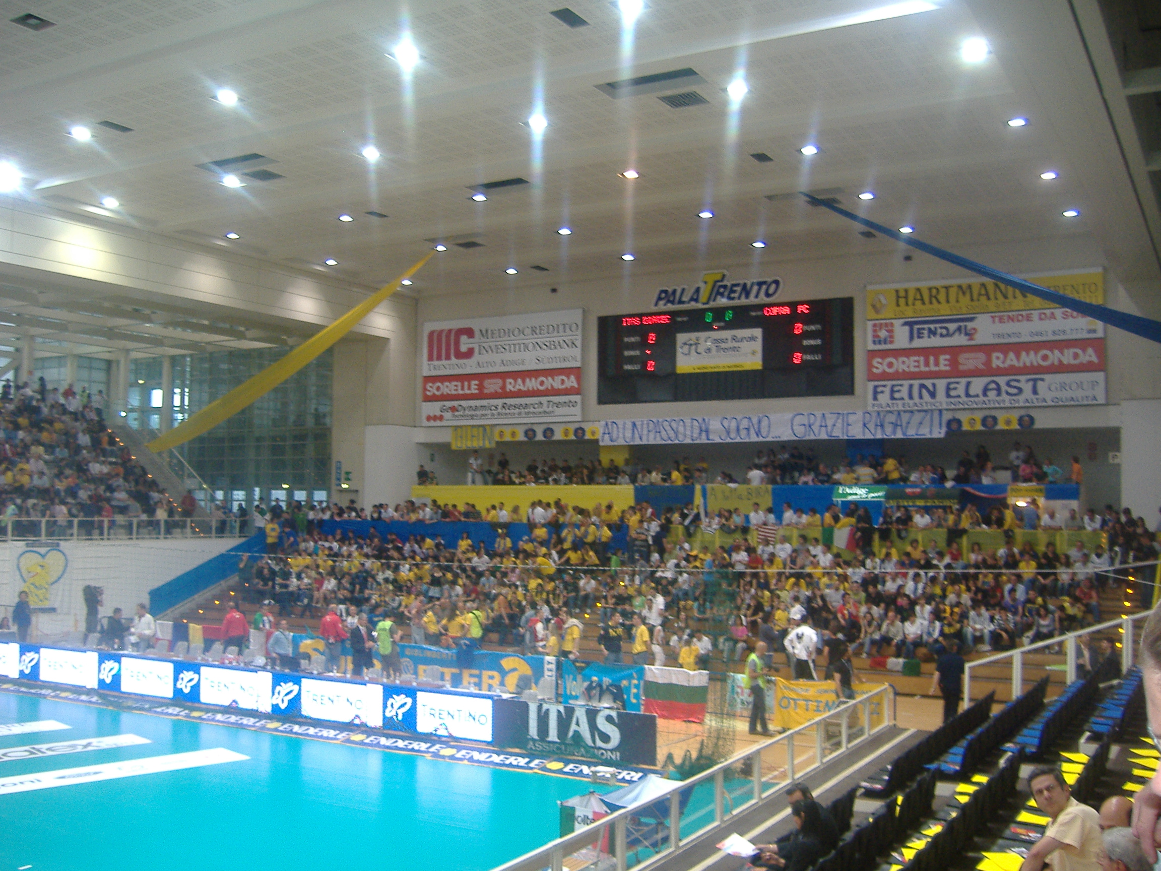 Curva Gislimberti durante la Finale scudetto 2008